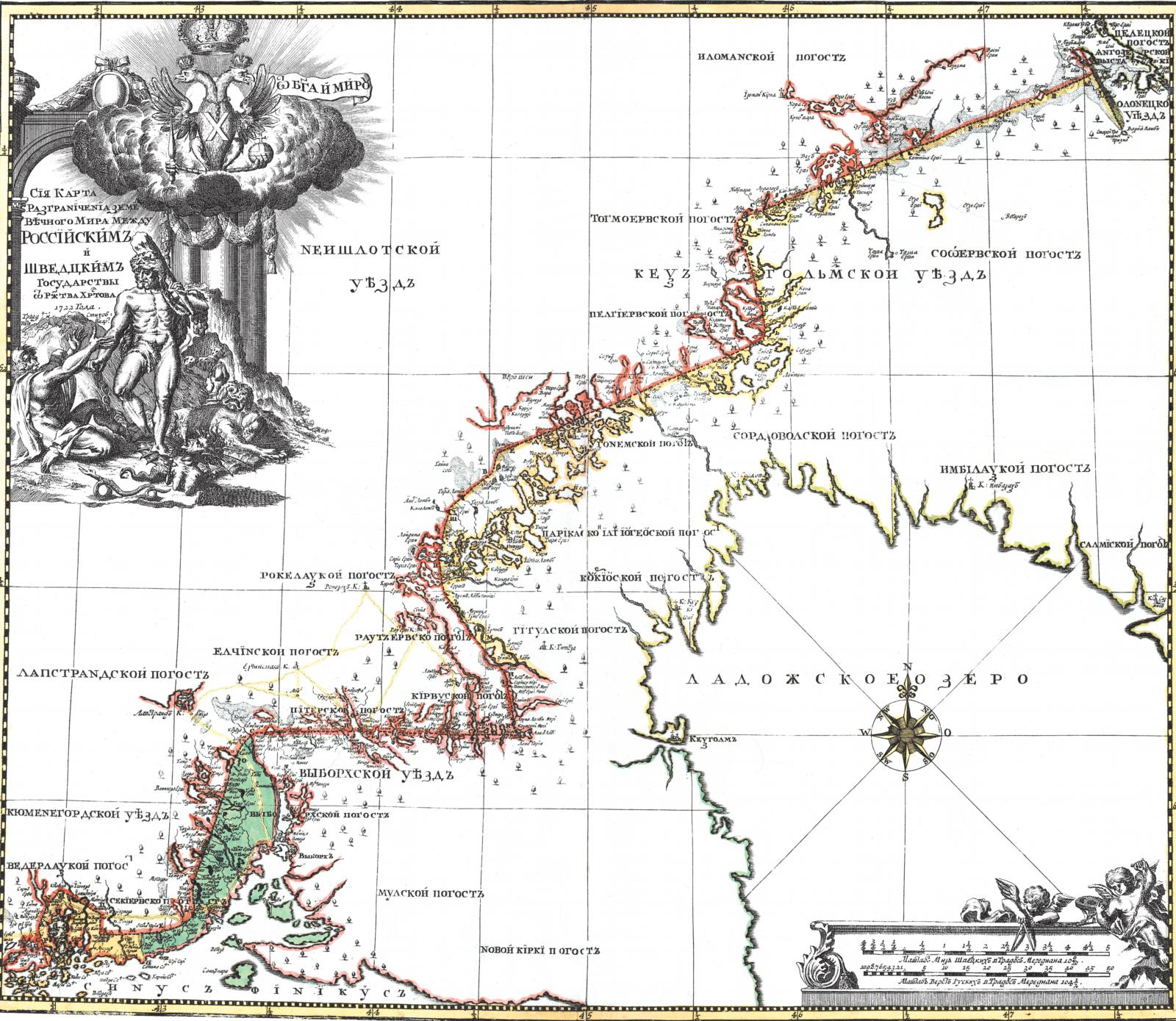 Карта разграничения земель между Российским и Шведским государствами согласно Ништадтскому мирному договору (1722)